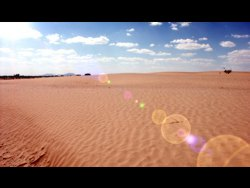 Viesca Dunes